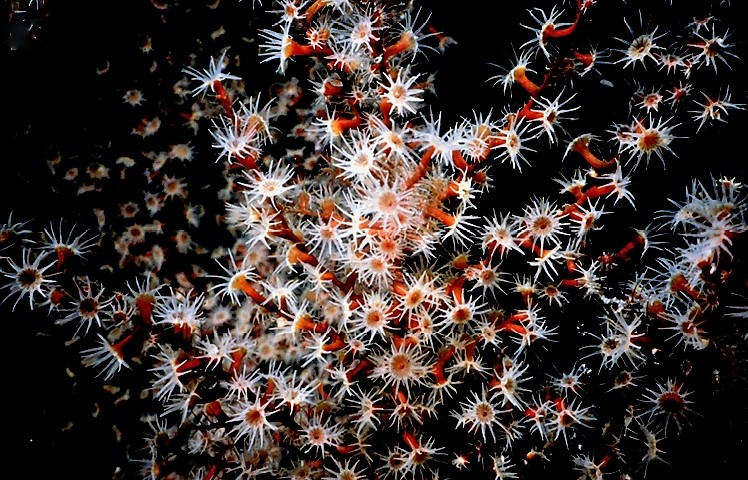 Hydrozoanthus sp. en la isla de Balicasag, Estrecho de Cebú, Filipinas,1999. Reimer J, Poliseno A, Hoeksema B (2014) Shallow-water zoantharians (Cnidaria, Hexacorallia) from the Central Indo-Pacific. ZooKeys 444: 1-57.